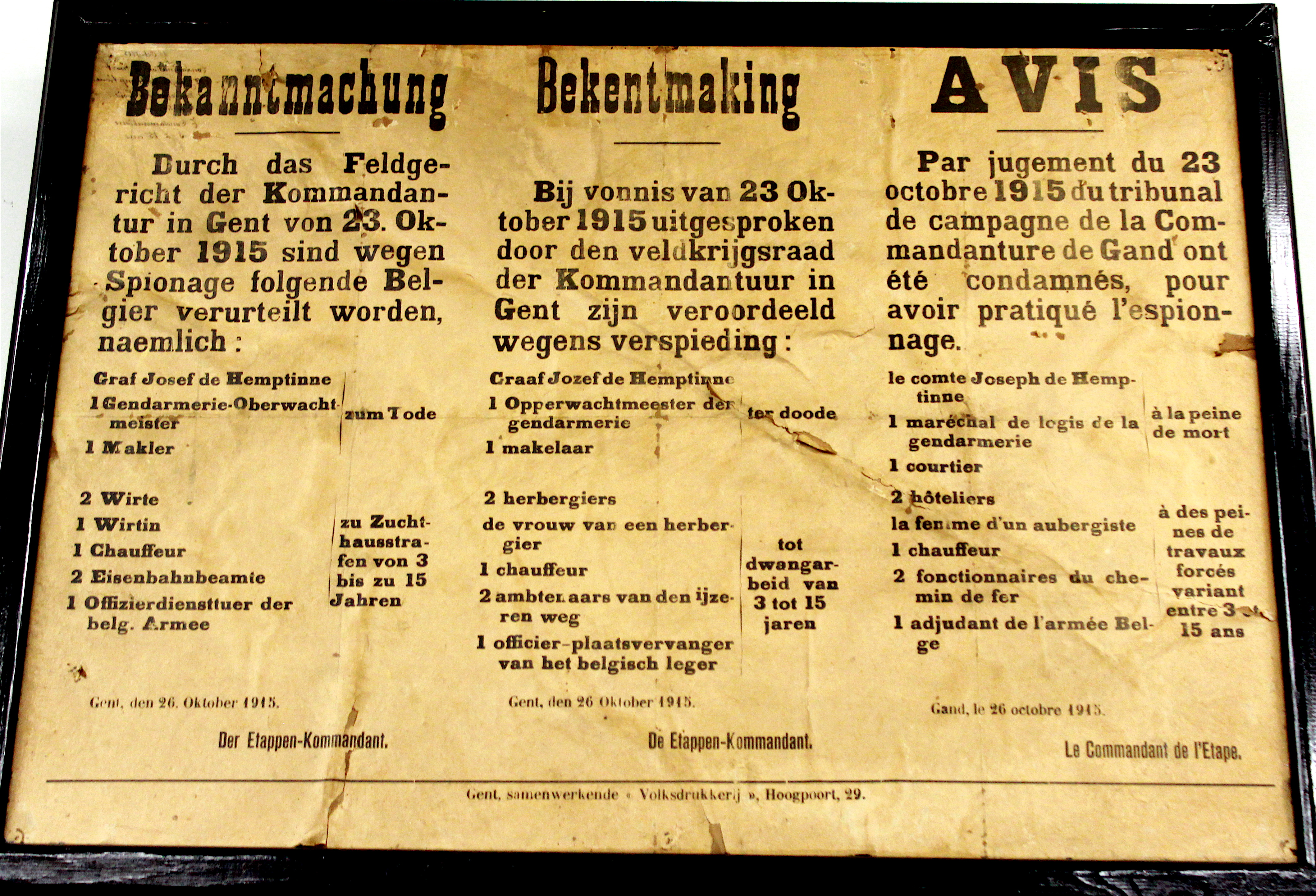 bekendmaking van Josef de Hemptinne